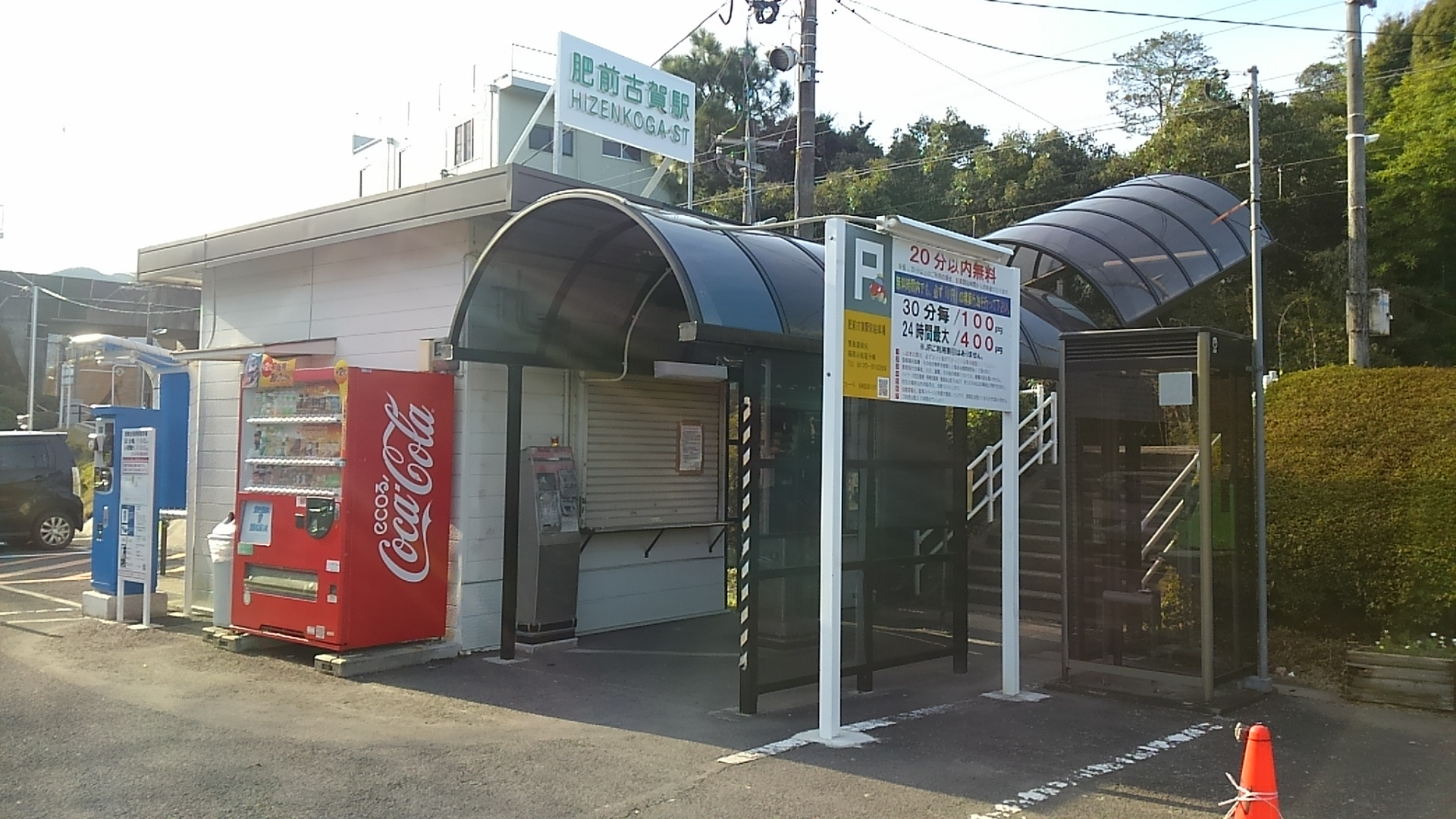 2015年12月29日に撮影